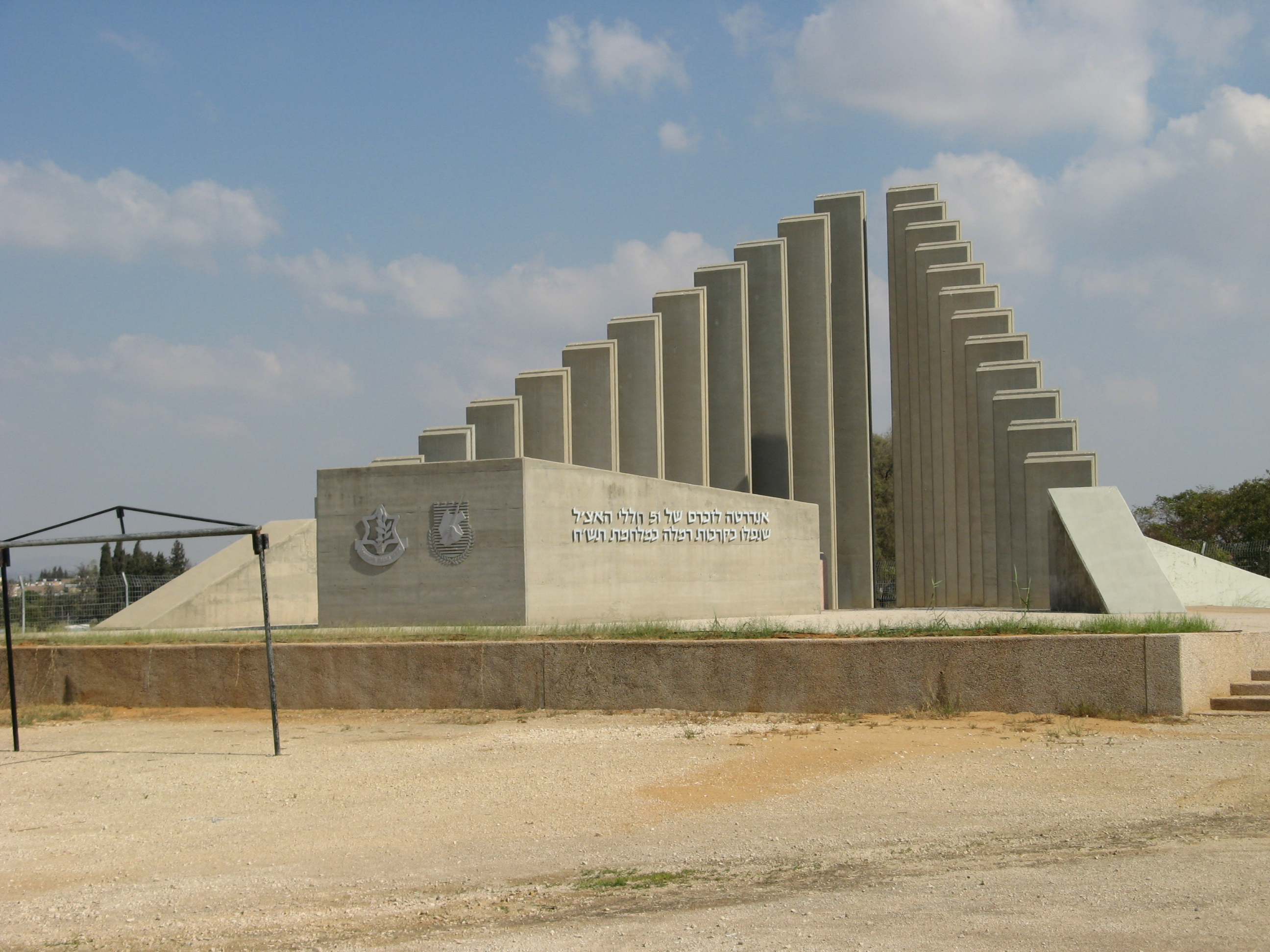 אנדרטת האצל ברמלה